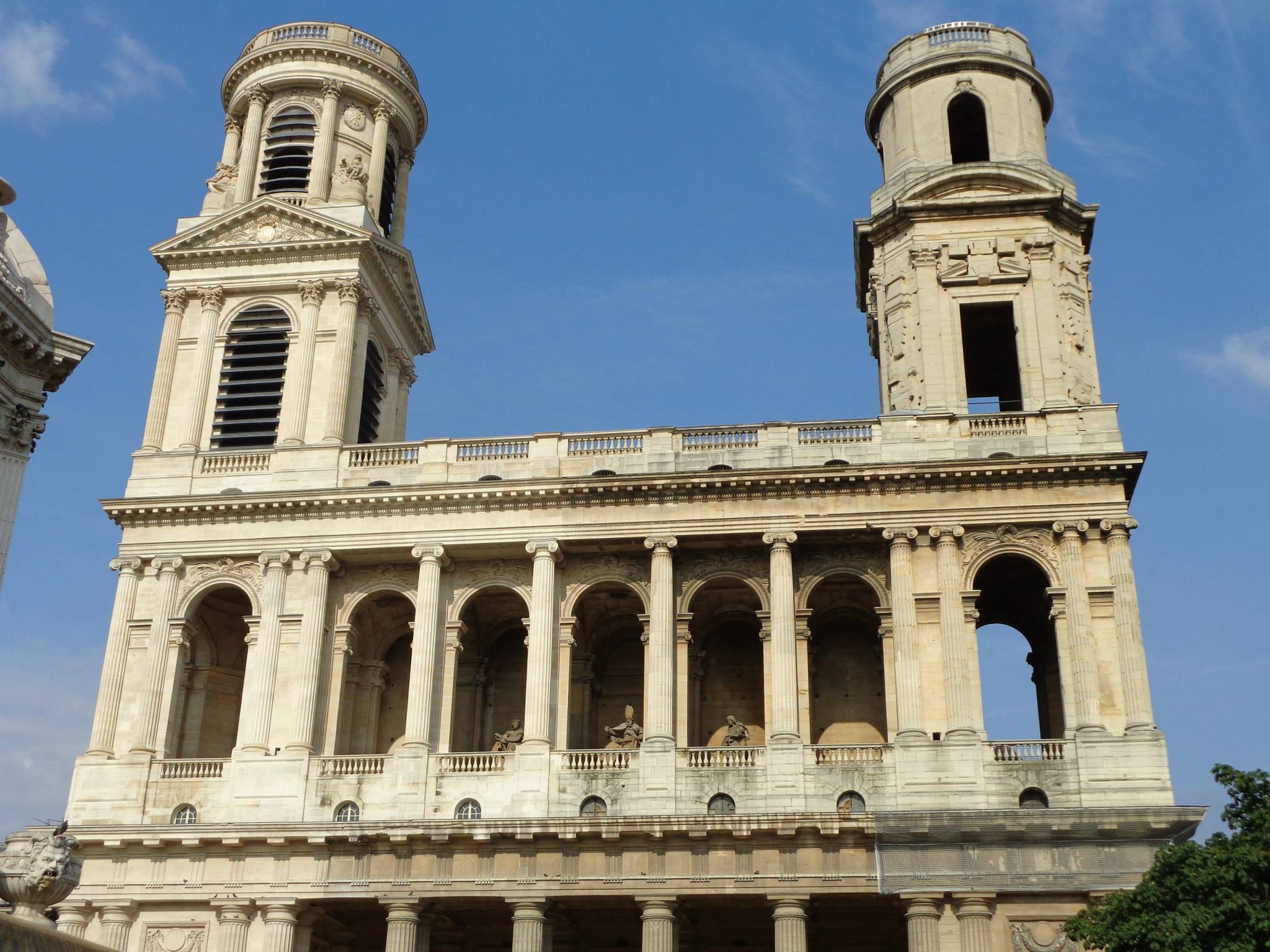 église Saint-Sulpice